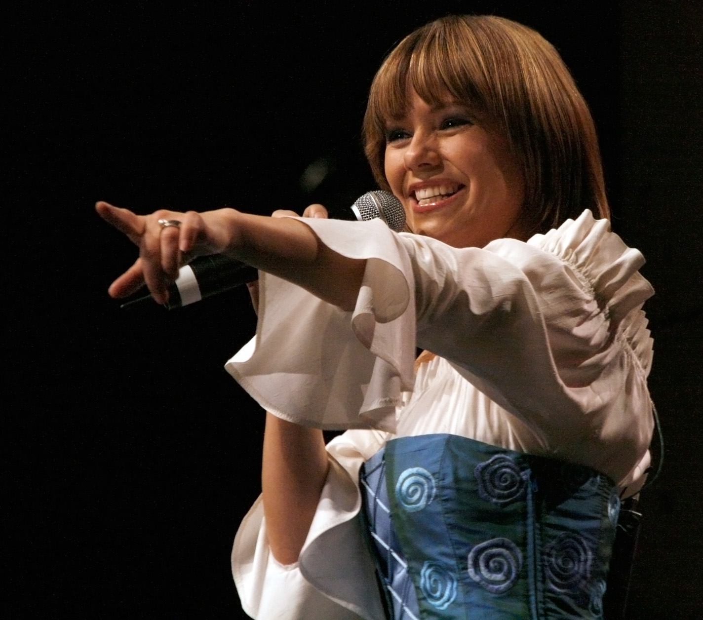 Category:Francine Jordi mit der Musikantenstadl-Tournee in der Wiener Stadthalle.